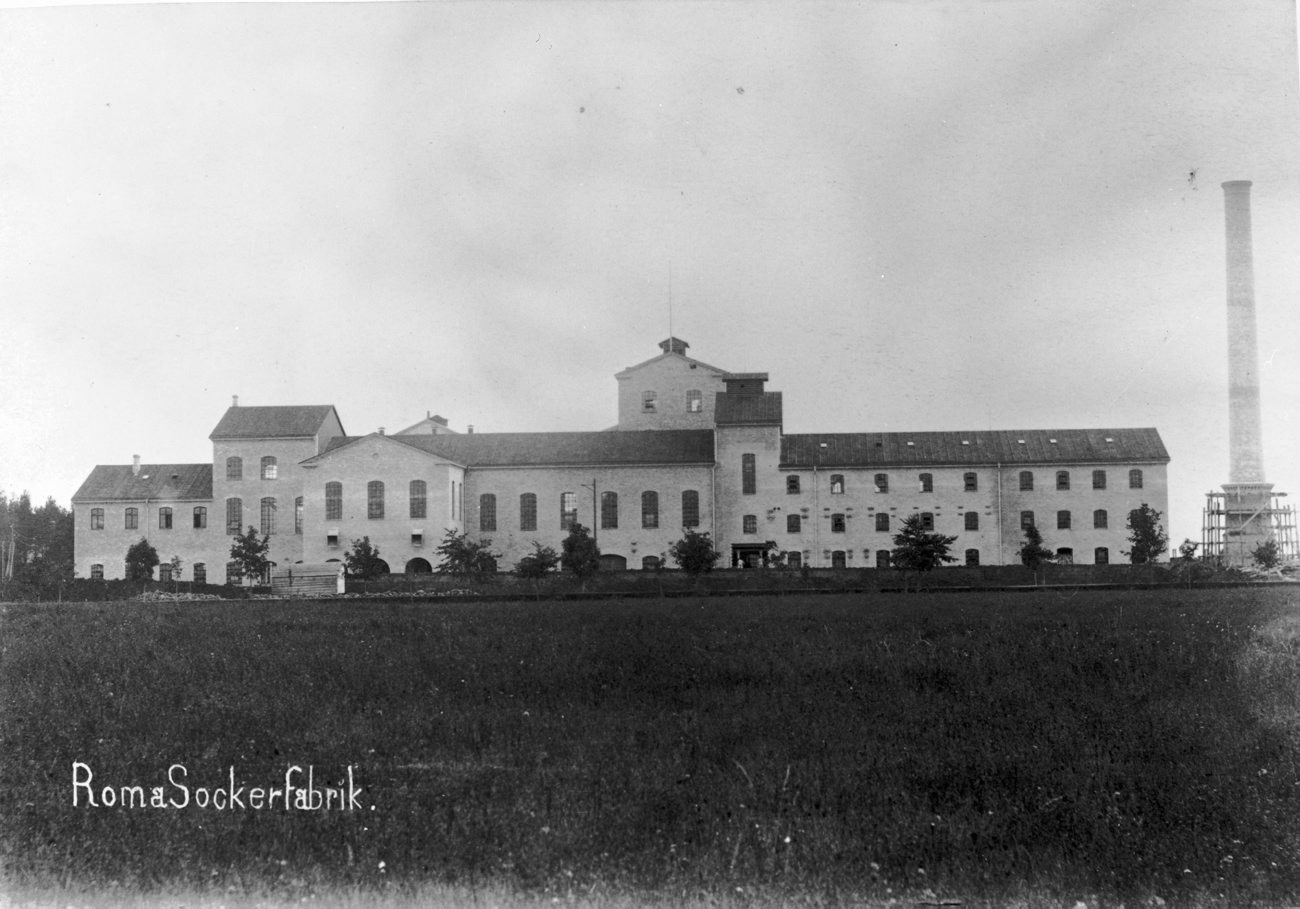 B17489. Roma Sockerfabrik. Fotografiet är skänkt till Tekniska museet från Svenska Turistföreningen.